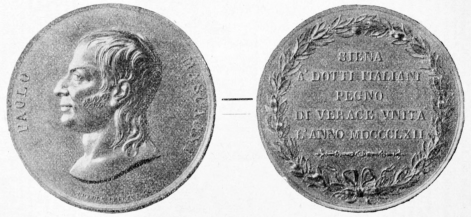 Medaglia per la decima riunione degli scienziati italiani